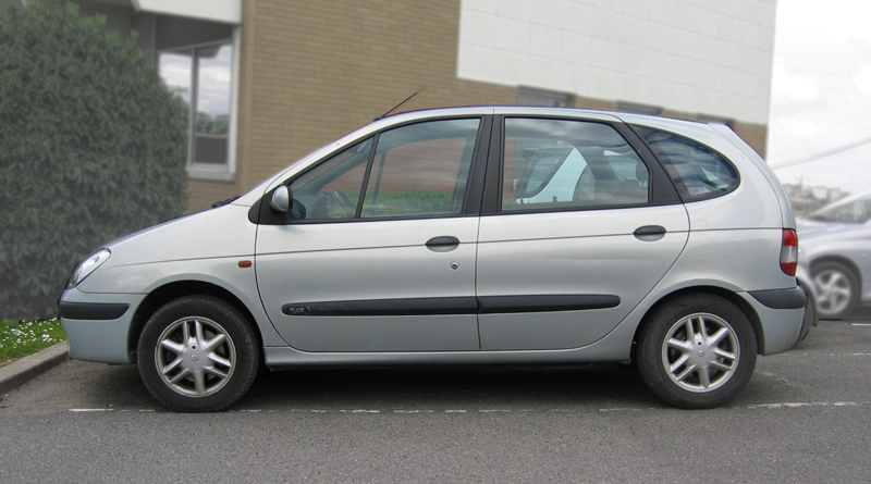 Renault Scenic Personal picture